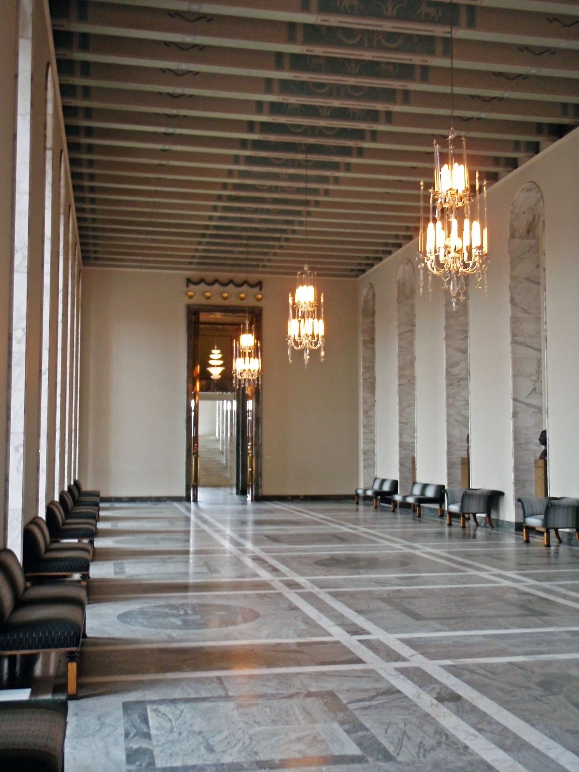 Valtiosali Suomen Eduskuntatalossa.